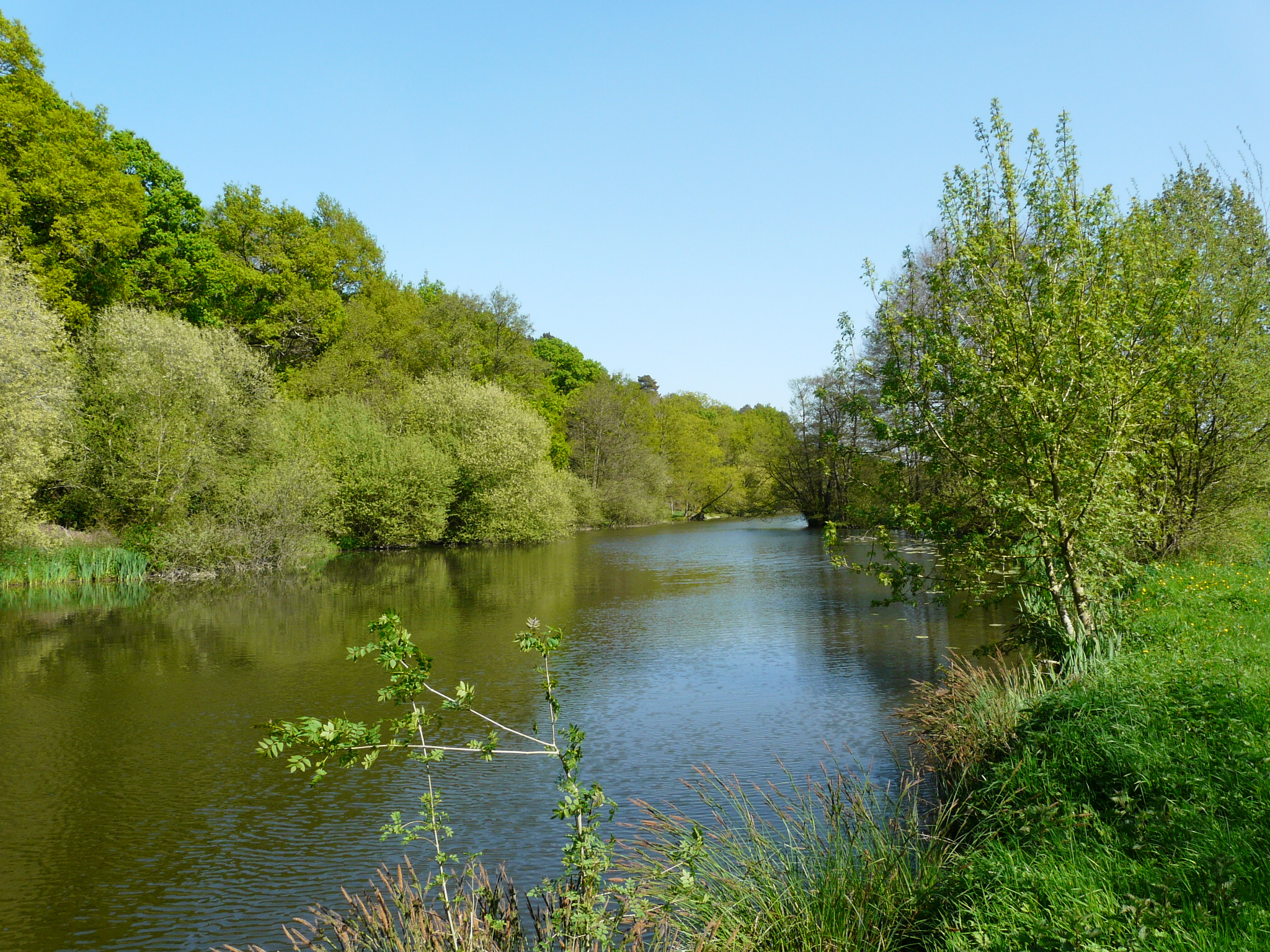 Le Don et sa vallée à l'aval de l'hippodrome